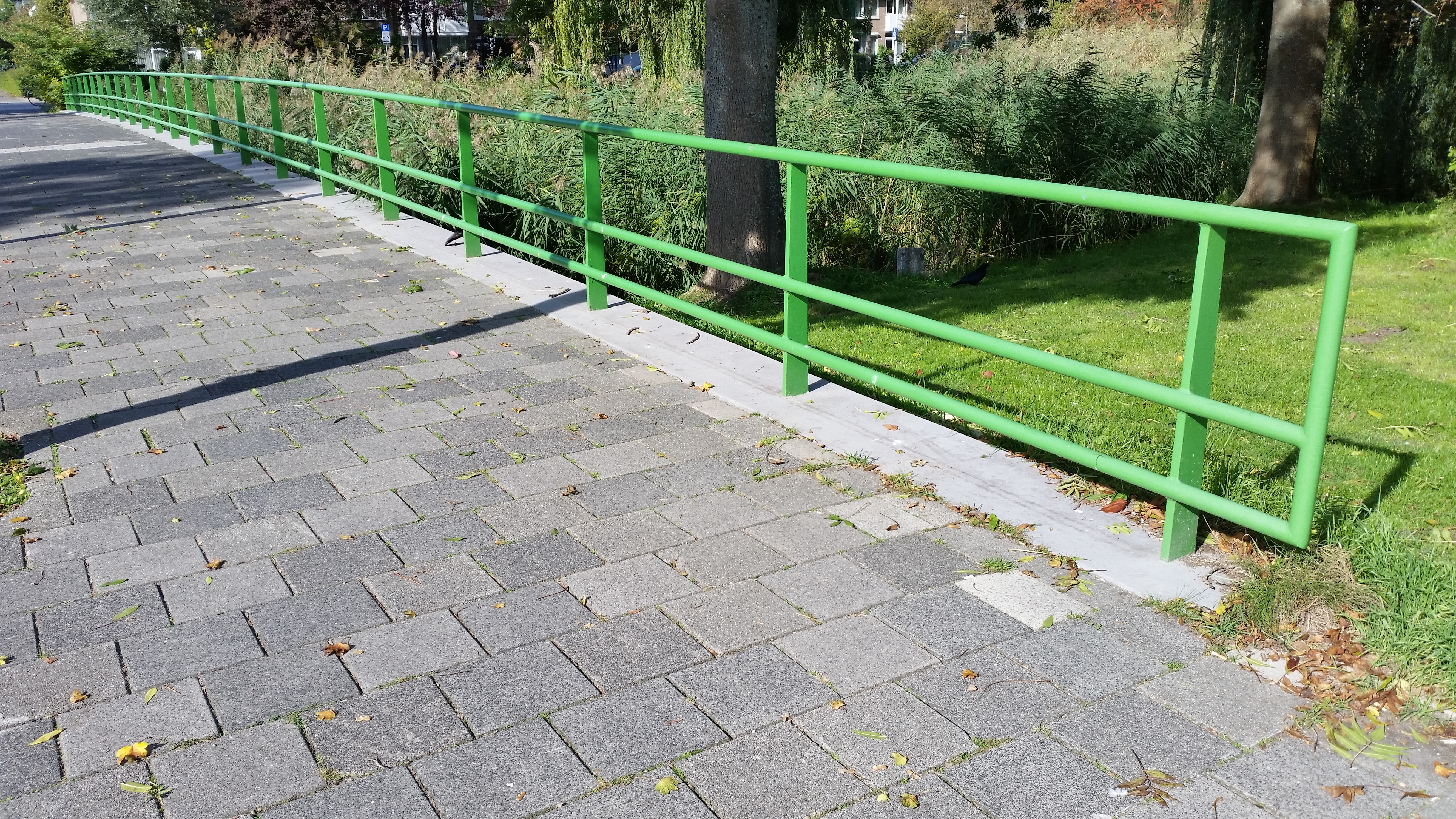 Brug 802 (in Amsterdam), leuning met brugwelving